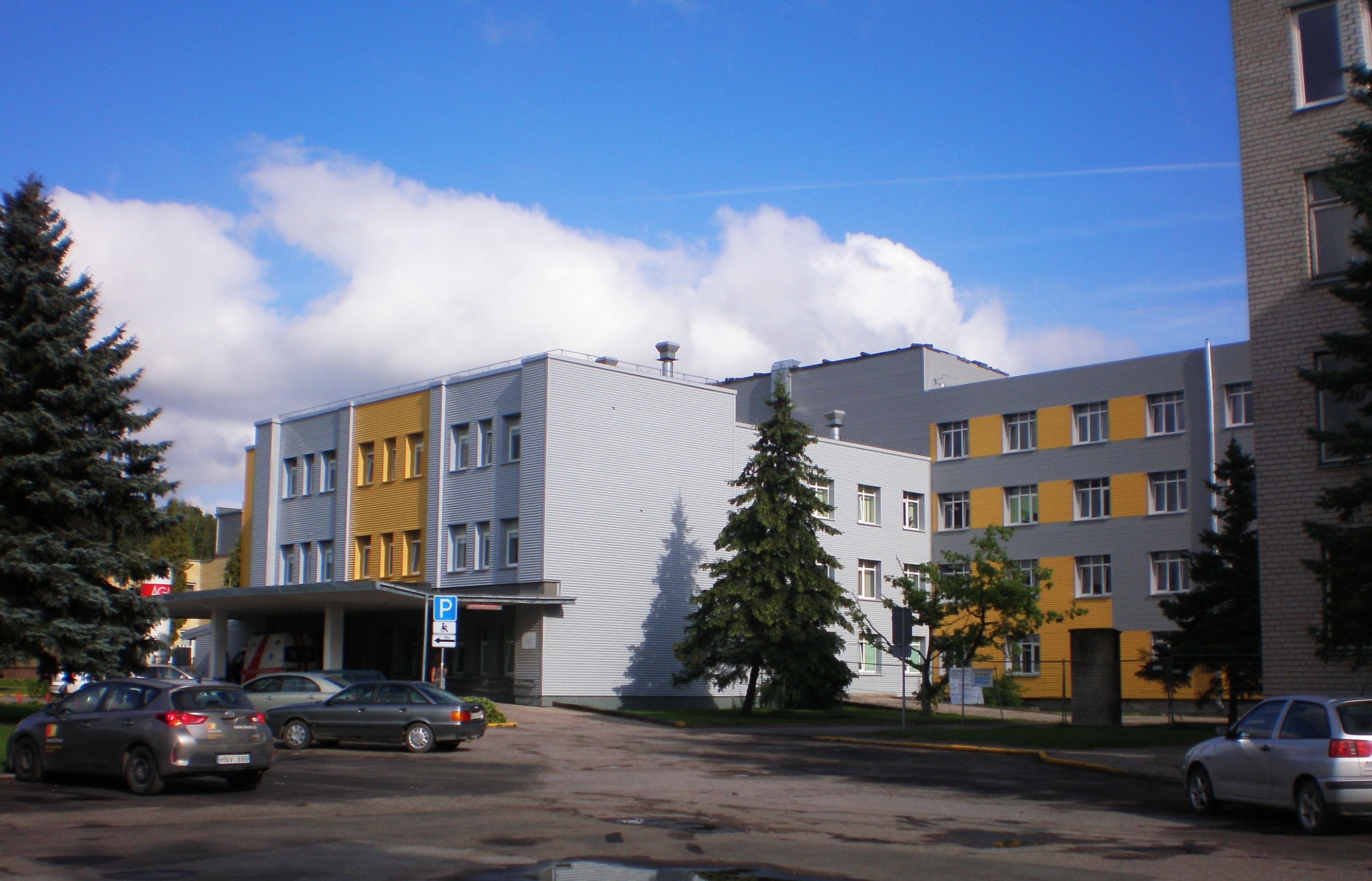 Kėdainių ligoninės priėmimo skyrius